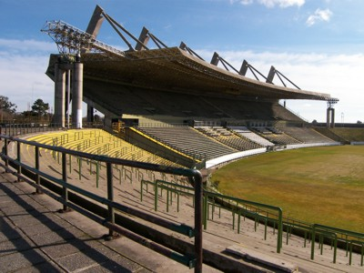 Estadio Mundialista José María Minella.